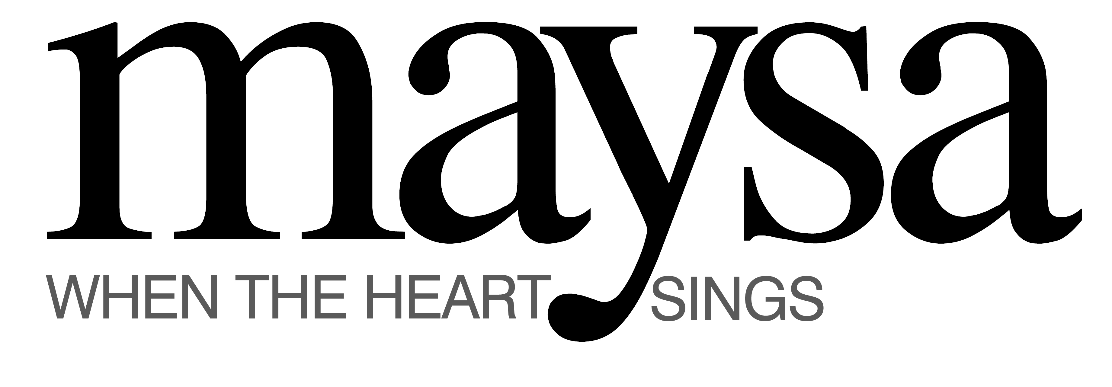 Logo - Maysa: Quando Fala o Coração